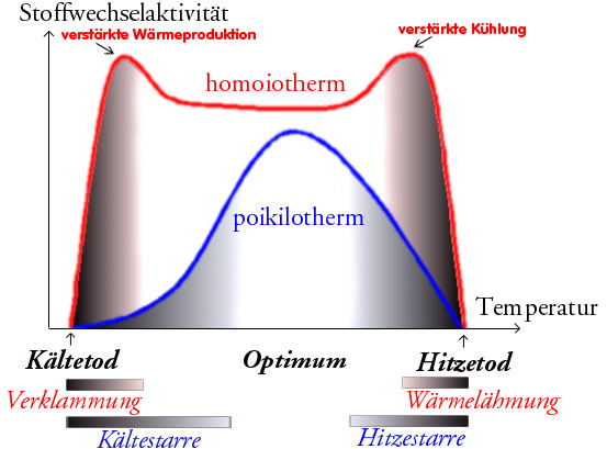 Temperaturregulation - Vergleich homoio-/poikilotherm